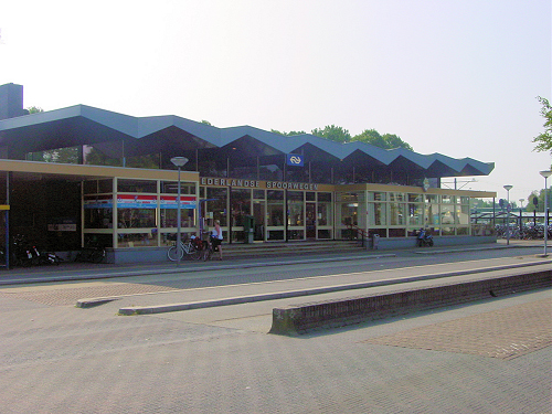 Station Emmen